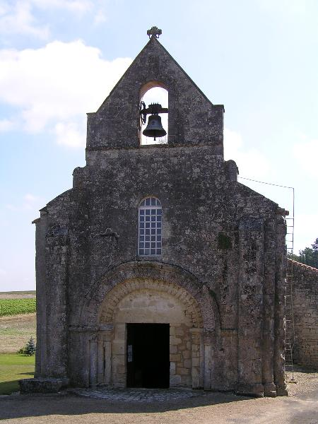 église d'Anville, Charente, France